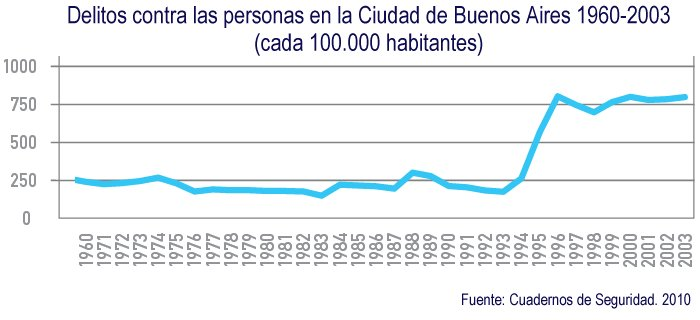 Criminalidad contra las personas en la ciudad de Buenos Aires 1960-2003. Fuente Cuadernos de Seguridad, octubre 2010, nos 12/13, ISSN 1850-3675, Buenos Aires, "El delito común en la ciudad de Buenos Aires en el siglo XX", Mariano Ciafardini, p. 26.